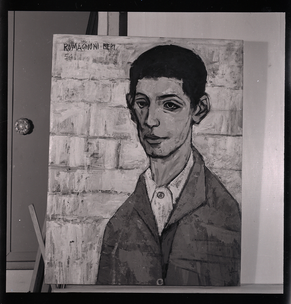 Servizio fotografico : Milano, 1955 / Paolo Monti. - Buste: 1, Fototipi: 75 : Negativo b/n, gelatina bromuro d'argento/ pellicola ; 6x6. - ((Serie costituita da 1 portanegativi contenente 75 negativi sciolti identificati con i nn.: 16274, 16275, 16276, 16277, 16278, 16279, 16280, 16281, 16282, 16283, 16284, 16285, 16286, 16287, 16288, 16289, 16290, 16291, 16292, 16293, 16294, 16295, 16296, 16297, 16298, 16299, 16300, 16301, 16302, 16303, 16304, 16305, 16306, 16307, 16308, 16309, 16310, 16311, 16312, 16313, 16314, 16315, 16316, 16317, 16318, 16319, 16320, 16321, 16322, 16323, 16324, 16325, 16326, 16327, 16328, 16329, 16330, 16331, 16332, 16333, 16334, 16335, 16336, 16337, 16338, 16339, 16340, 16341, 16342, 16343, 16344, 16345, 16346, 16347, 16348. - I negativi (25 strisce) non sono identificabili singolarmente. - Sul portanegativi identificato con la numerazione 16274/348 iscrizione didascalica con data manoscritta a penna: "Premio/ Graziano/ 1954/ 'Autoritratto' ". - Il portanegativi è conservato insieme ad altri due contenitori senza iscrizione didascalica al recto del contenitore. - La suddetta serie è contenuta nella scatola R16017-16406 e identificata con l'iscrizione didascalica manoscritta a pennarello nero: "Artisti". - Alla Galleria del Cavallino l'esposizione del Premio Graziano si tenne dal 22 gennaio al 3 febbraio del 1955. - Occasione: Documentazione del IV Premio Graziano 1954, 1955